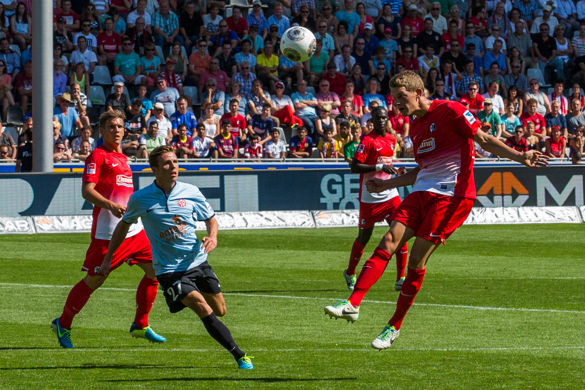 2ème journée de Bundesliga. Match SC Freiburg vs FSVMainz au MAGE SOLAR Stadion le samedi 17 août 2013.